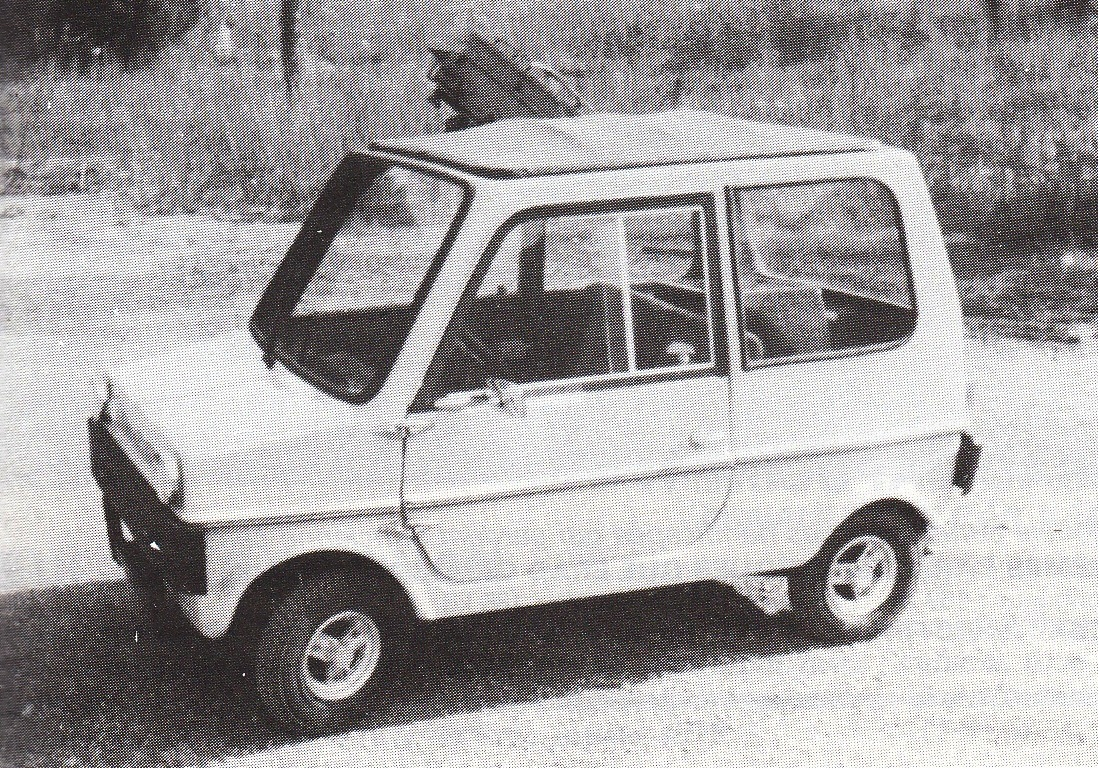 DUPORT minicar